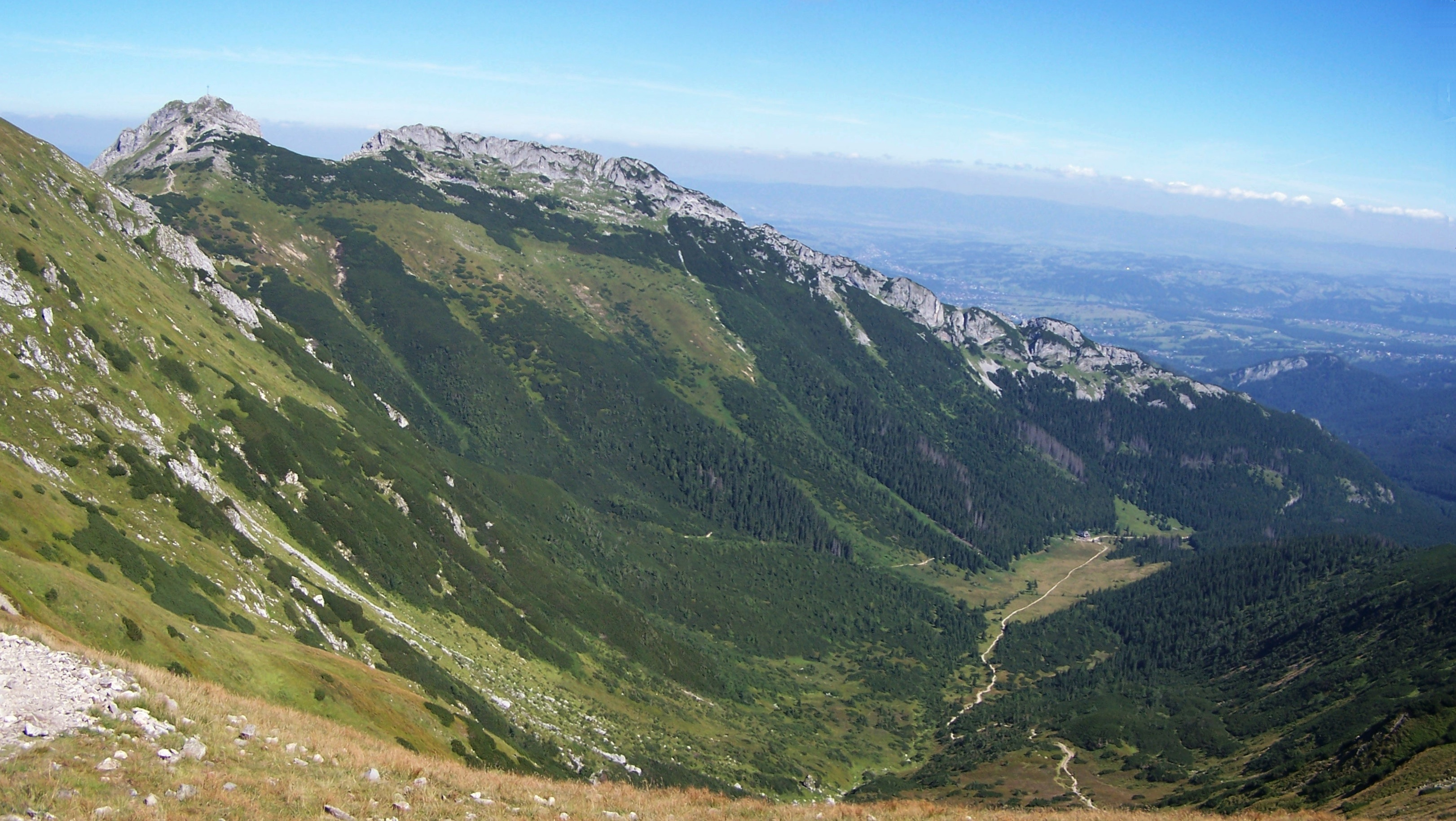 Dolina Kondratowa i Giewont